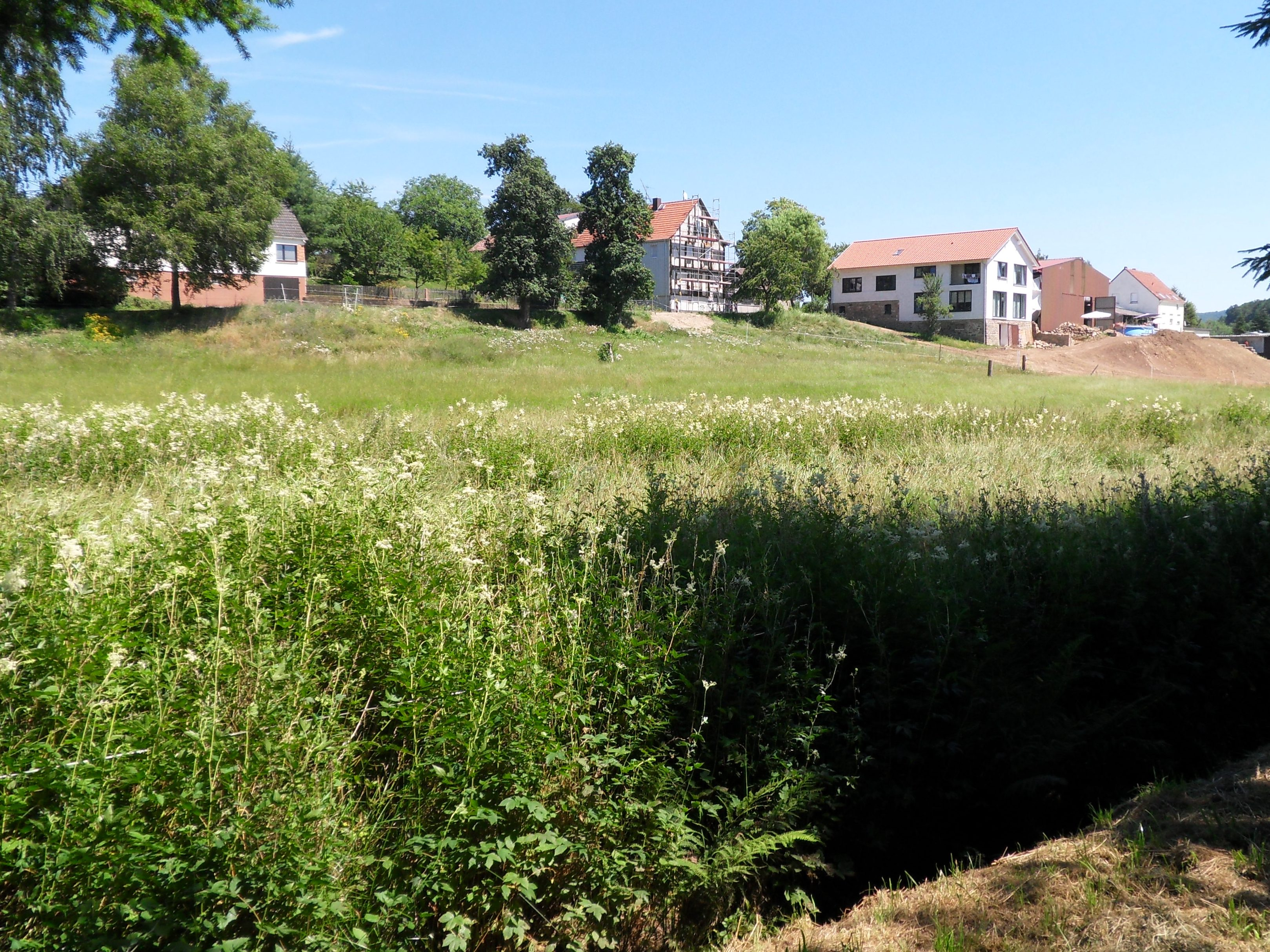 Blick über den Bierbach im Vordergrund auf die nördlichen Bierbacher Gehöfte. Der Bach ist Gemarkungs- und Gemeindegrenze und teilt den Weiler zwischen Wersau im Norden und Fränkisch-Crumbach im Süden auf.